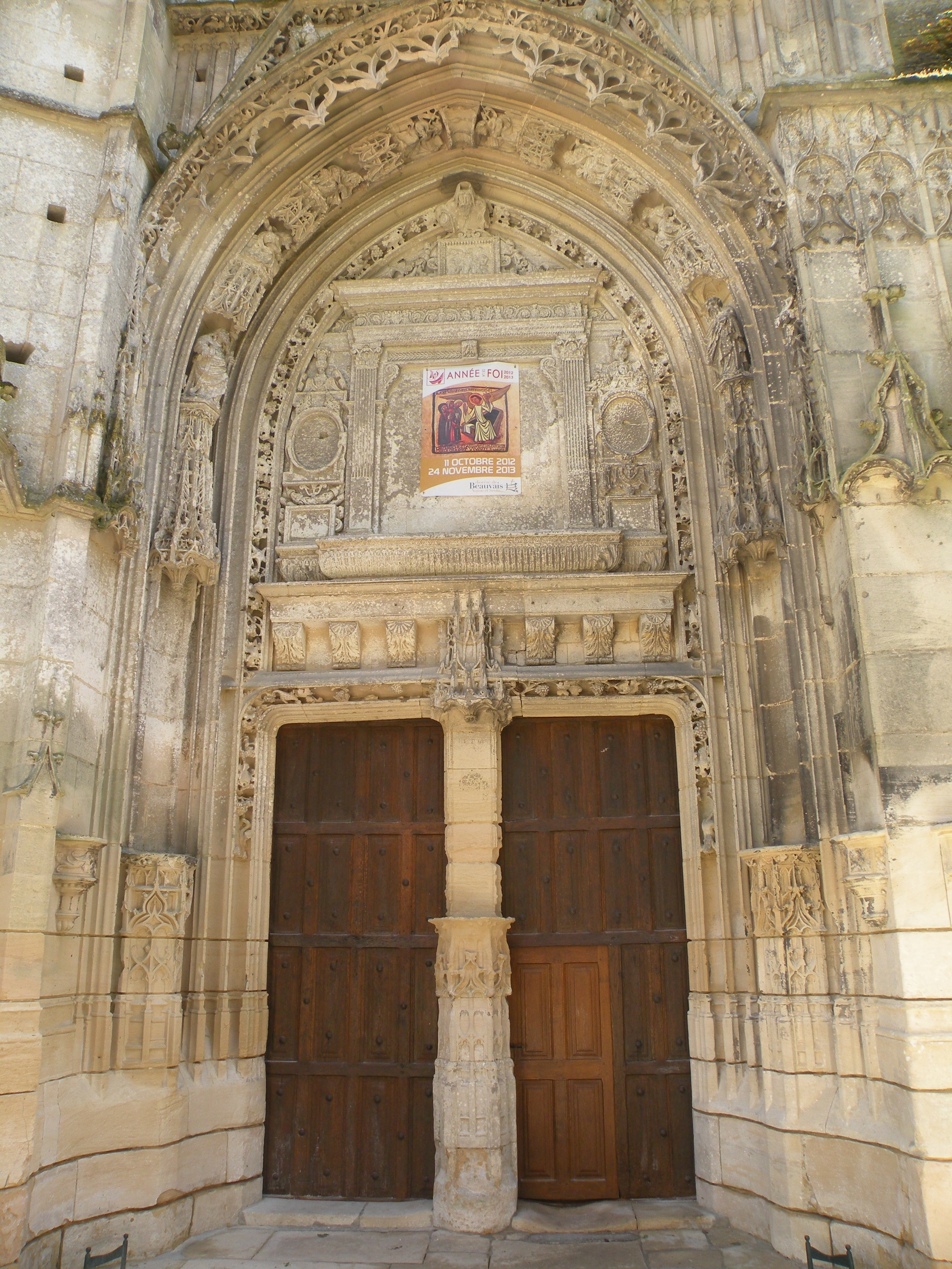 Église Saint-Jean-Baptiste de Chaumont-en-Vexin